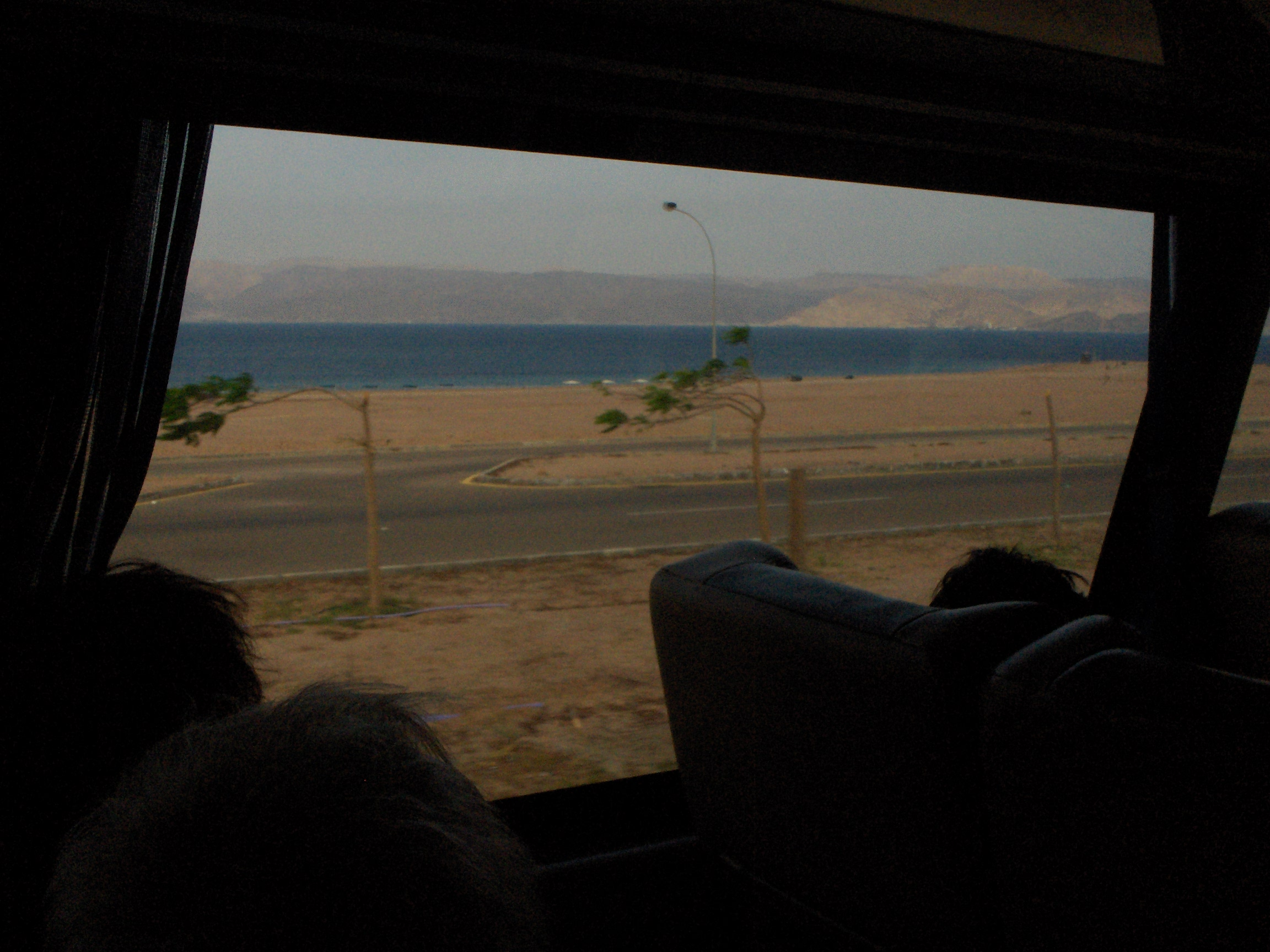 Il Mar Rosso visto da Aqaba, Giordania